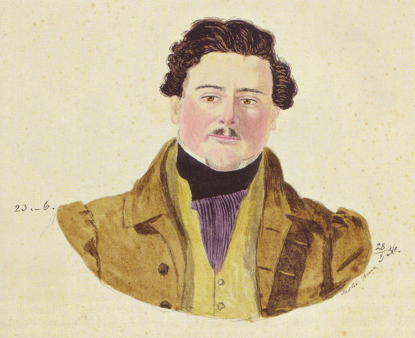 Porträtquarell von Anton Rehaag (1812–1864)